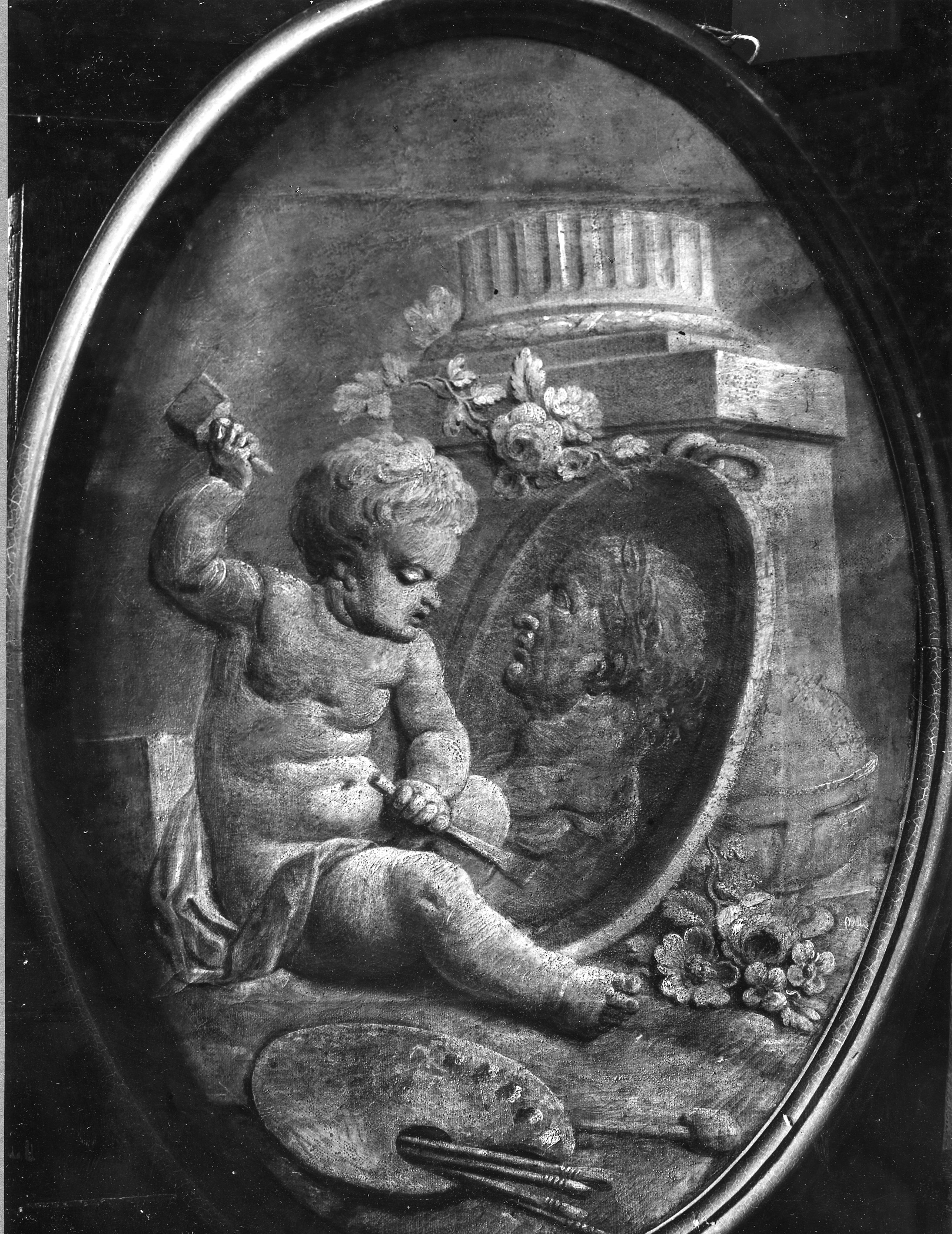 Grisaille door P.J. Denis, voorstellende een engeltje dat een portret uithouwt.